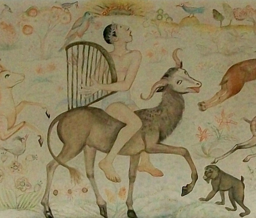 Anita Rée: Orpheus mit den Tieren, Wandbild um 1930 (Ausschnitt), früher Gymnasium für Mädchen (OCV) in der Caspar-Voght-Straße in Hamburg, heute die Ballettschule des Hamburg Ballett. Genehmigung zum Fotografieren liegt vor. This is a photograph of an architectural monument.